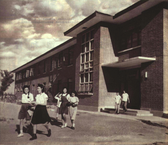 1952年 北京农业大学 五一楼 女生宿舍